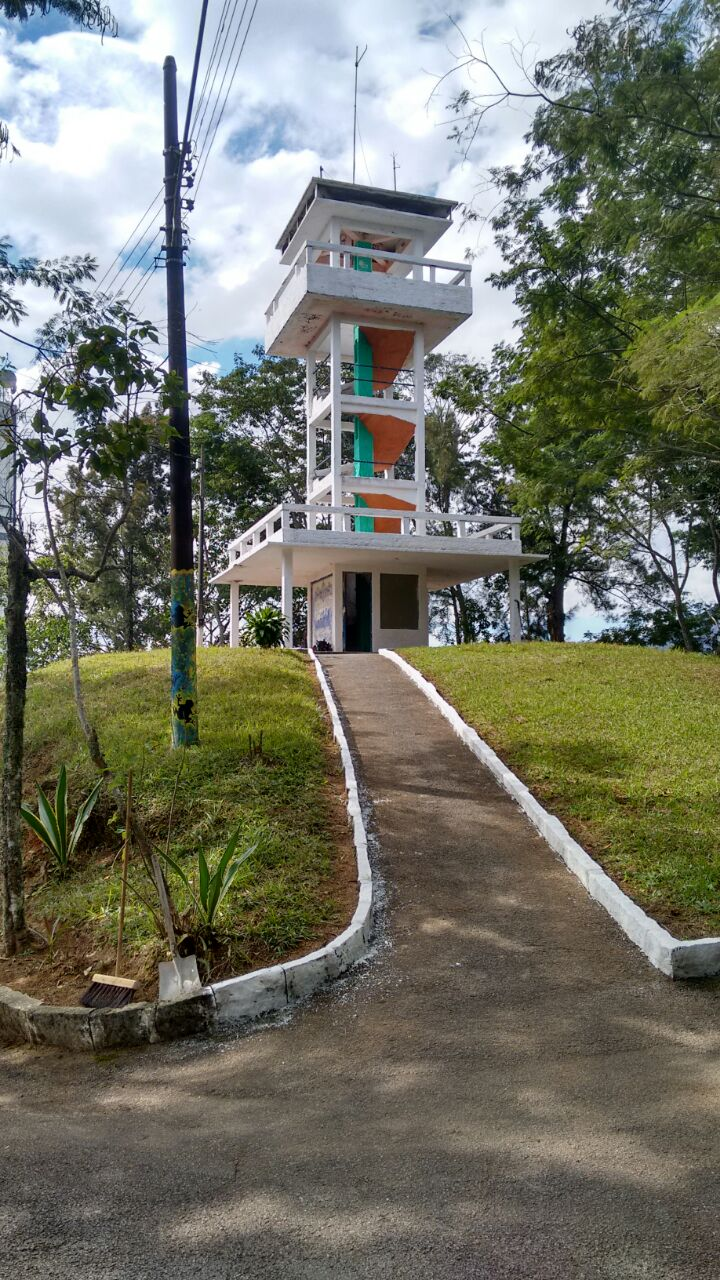 Colina dos Mirantes, ponto turístico de Teresópolis, Rio de Janeiro, em junho de 2016.